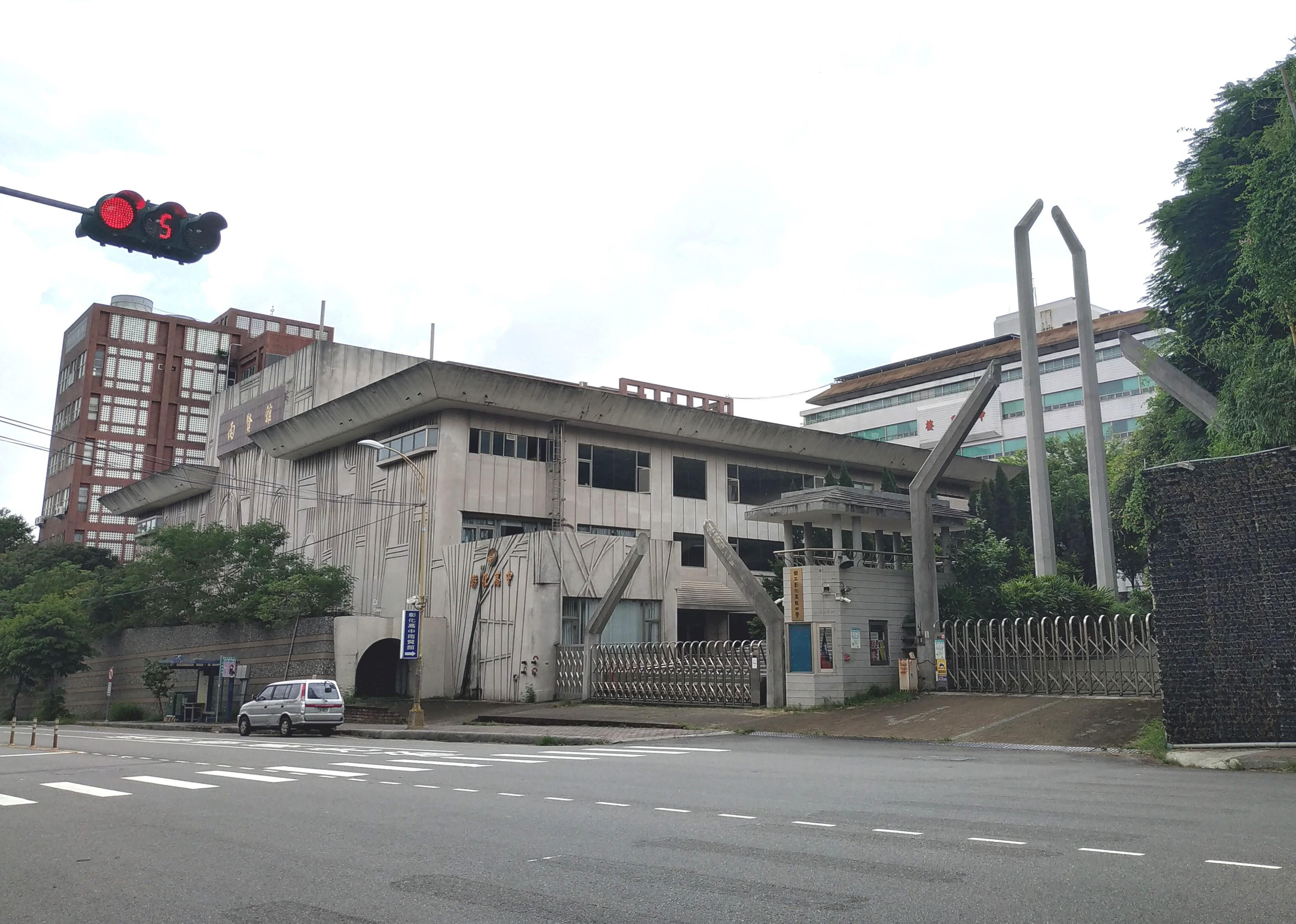 彰化高中(簡稱彰中)位於中興路的校門。